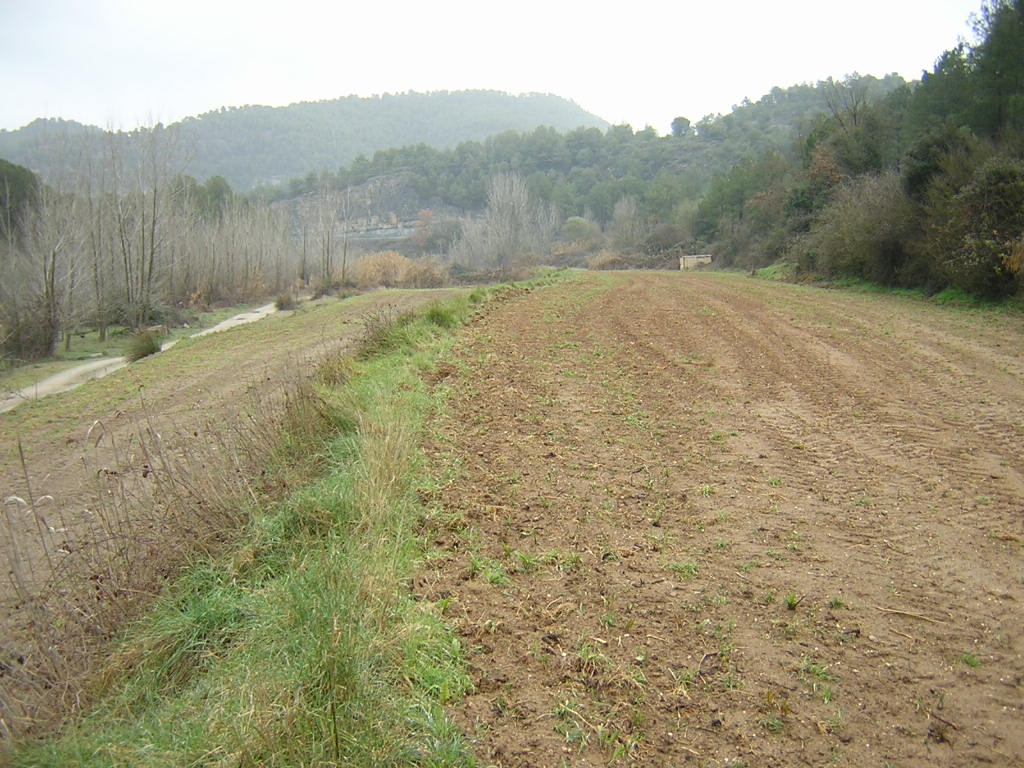 Els Horts del Rial de la Païssa (Monistrol de Calders, Moianès)